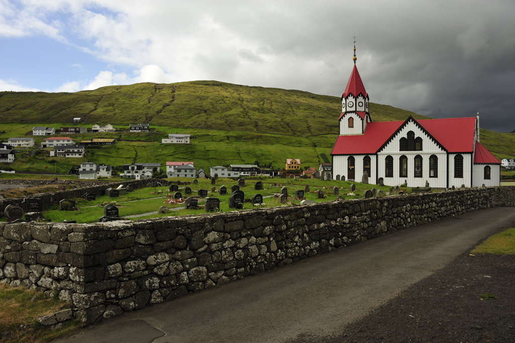 In der markanten Kirche von Sandavágur, die 1917 errichtet wurde, befindet sich einer der wichtigsten archäologischen Funde der Färöer: ein aus dem 12. Jahrhundert stammender Runenstein, dem zufolge ein gewisser Torkil Onundarson, Ostmann aus Rogaland, diese Stätte zuerst bewohnte. V. U. Hammershaimb, der Begründer der modernen färöischen Schriftsprache, wurde in Sandavágur geboren.